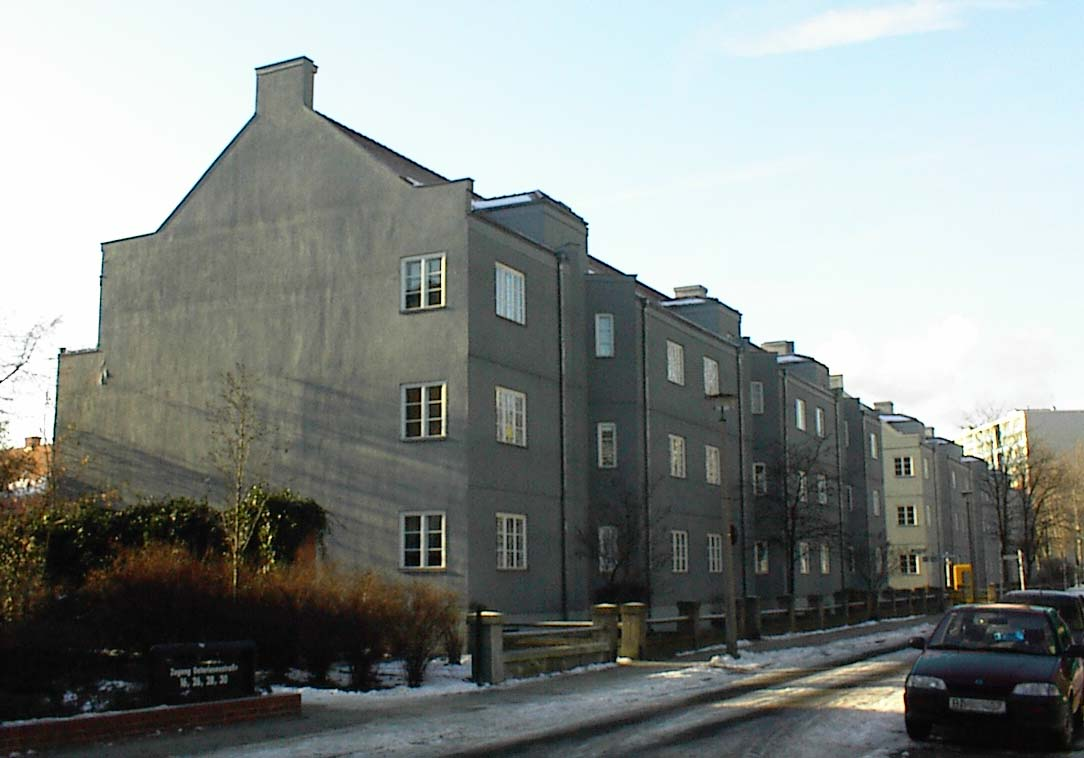 Splanemann-Siedlung in Berlin-Lichtenberg; 2006-01-11; Thomas Kayser (eigenes Foto); GNU-FDL